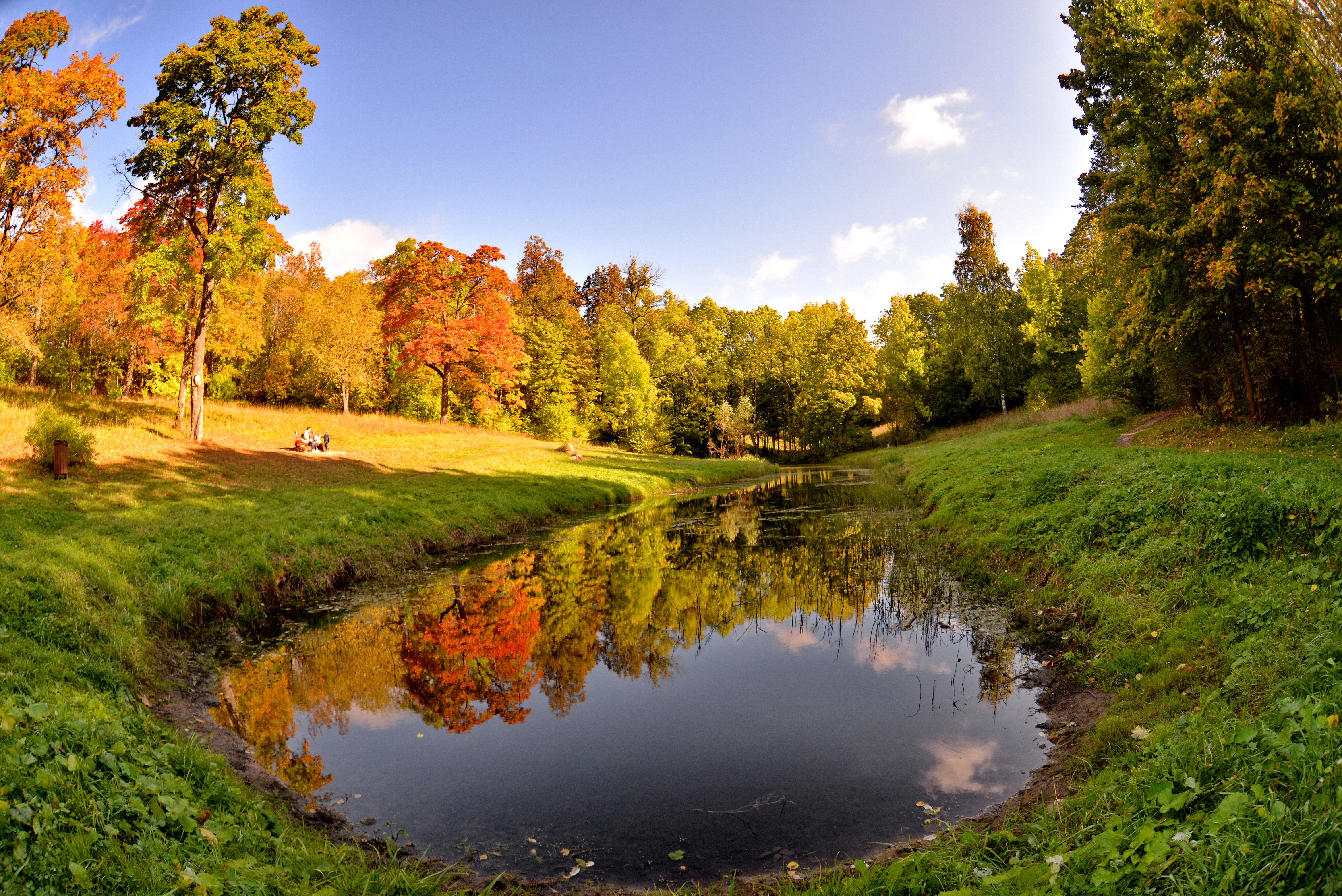 Дудергофские высоты: ландшафтные комплексы Ореховой и Вороньей гор на Дудергофской возвышенности, Санкт-Петербург, Красносельский район. This image is related to the protected area of Russia number 7810010